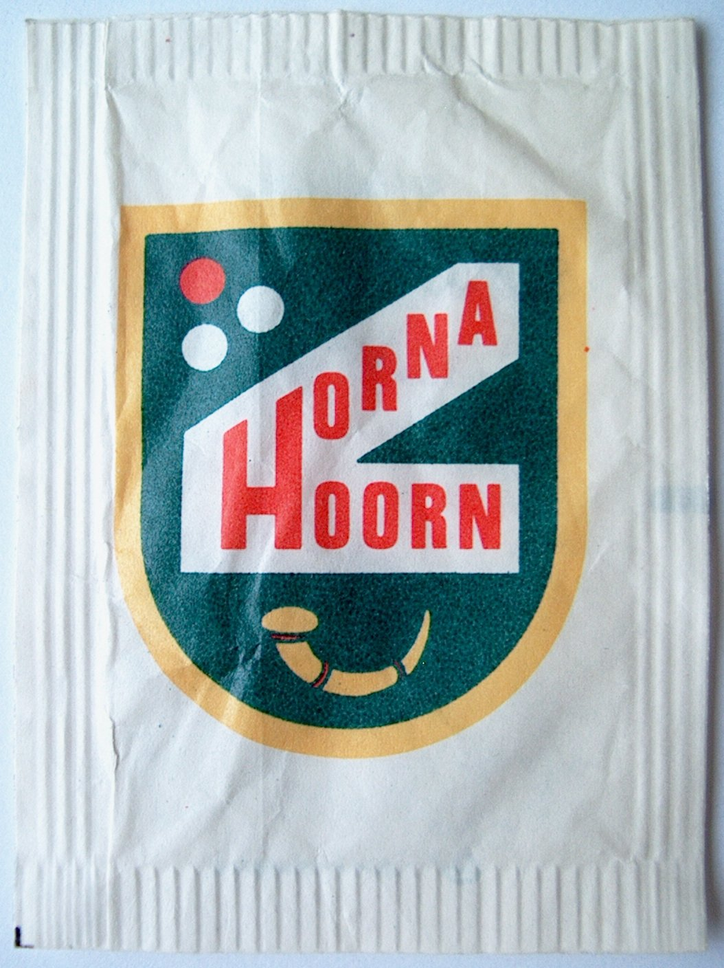 Suikerzakje. Eigen foto. PD.